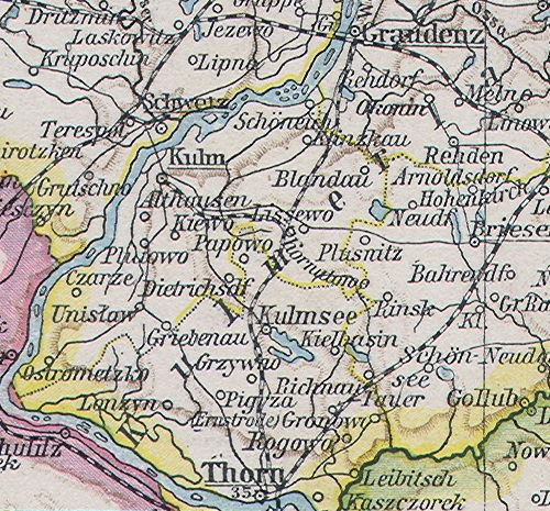 Kreis Kulm bis 1920, Ausschnitt aus